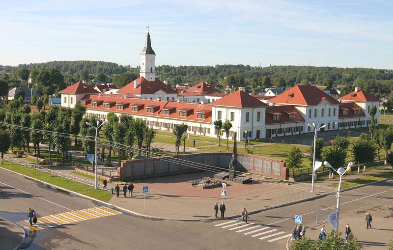 Гимназия города Шклова.